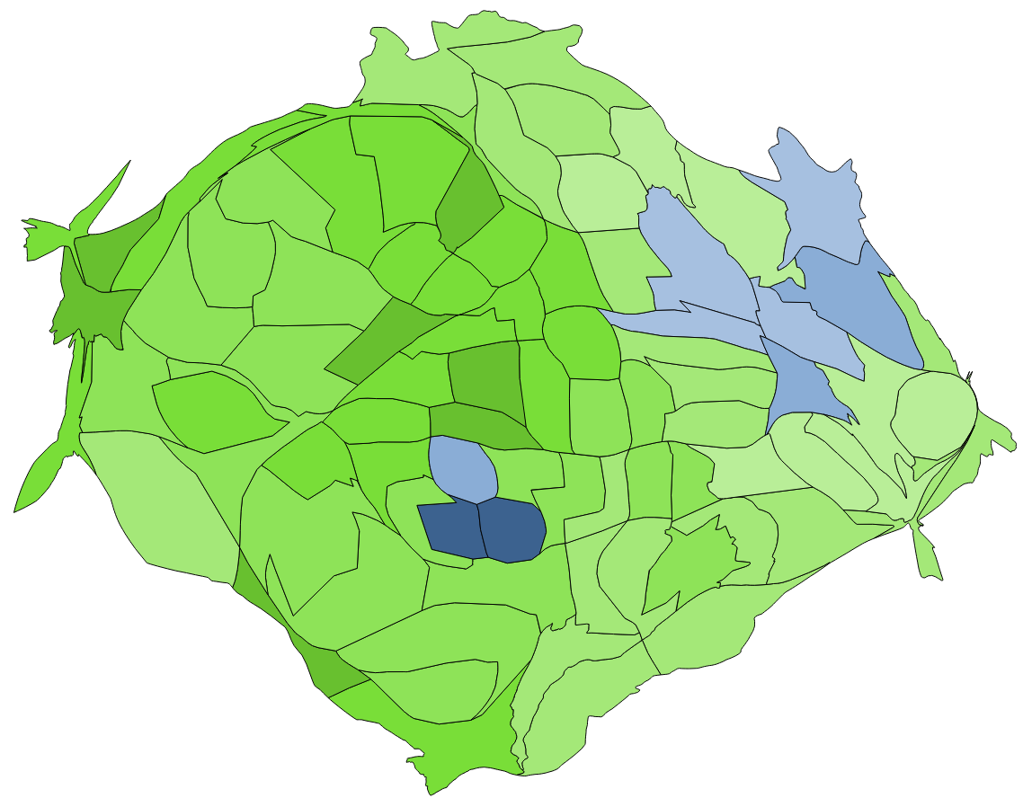 中文（台灣）: 顏色對照表